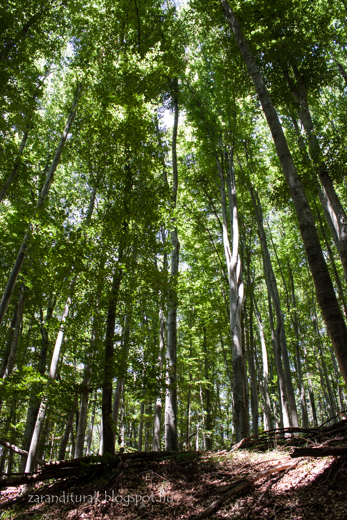 Bükkös a Hegyes-csúcs közelében